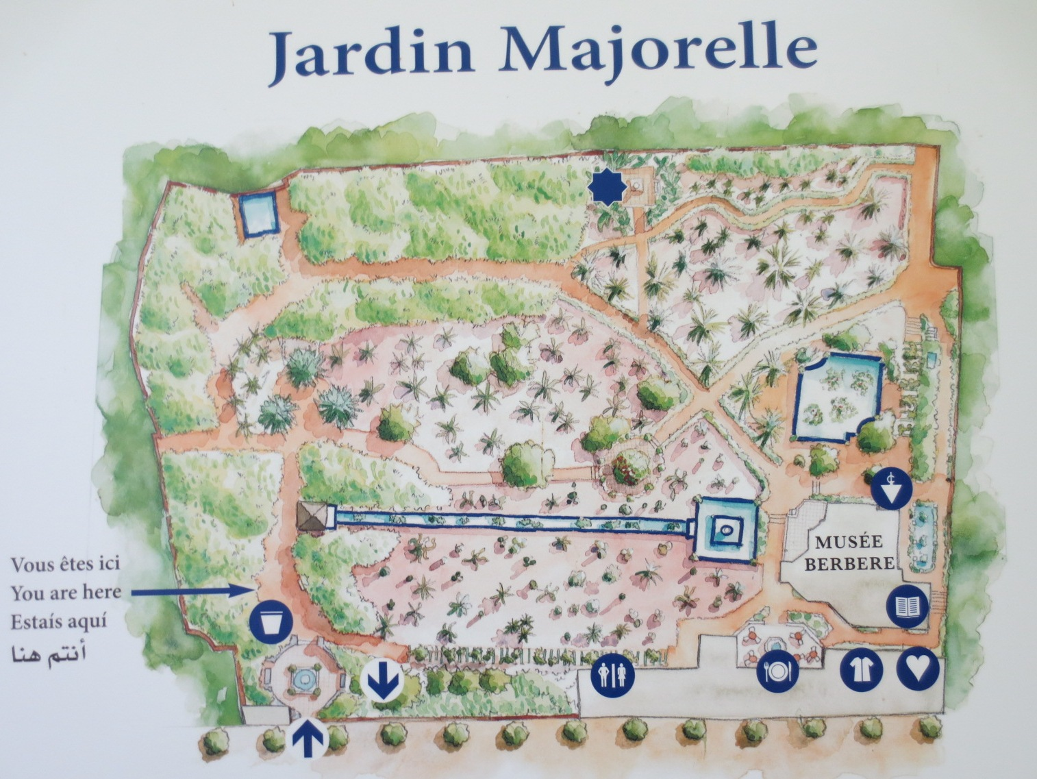 Majorelle Garden